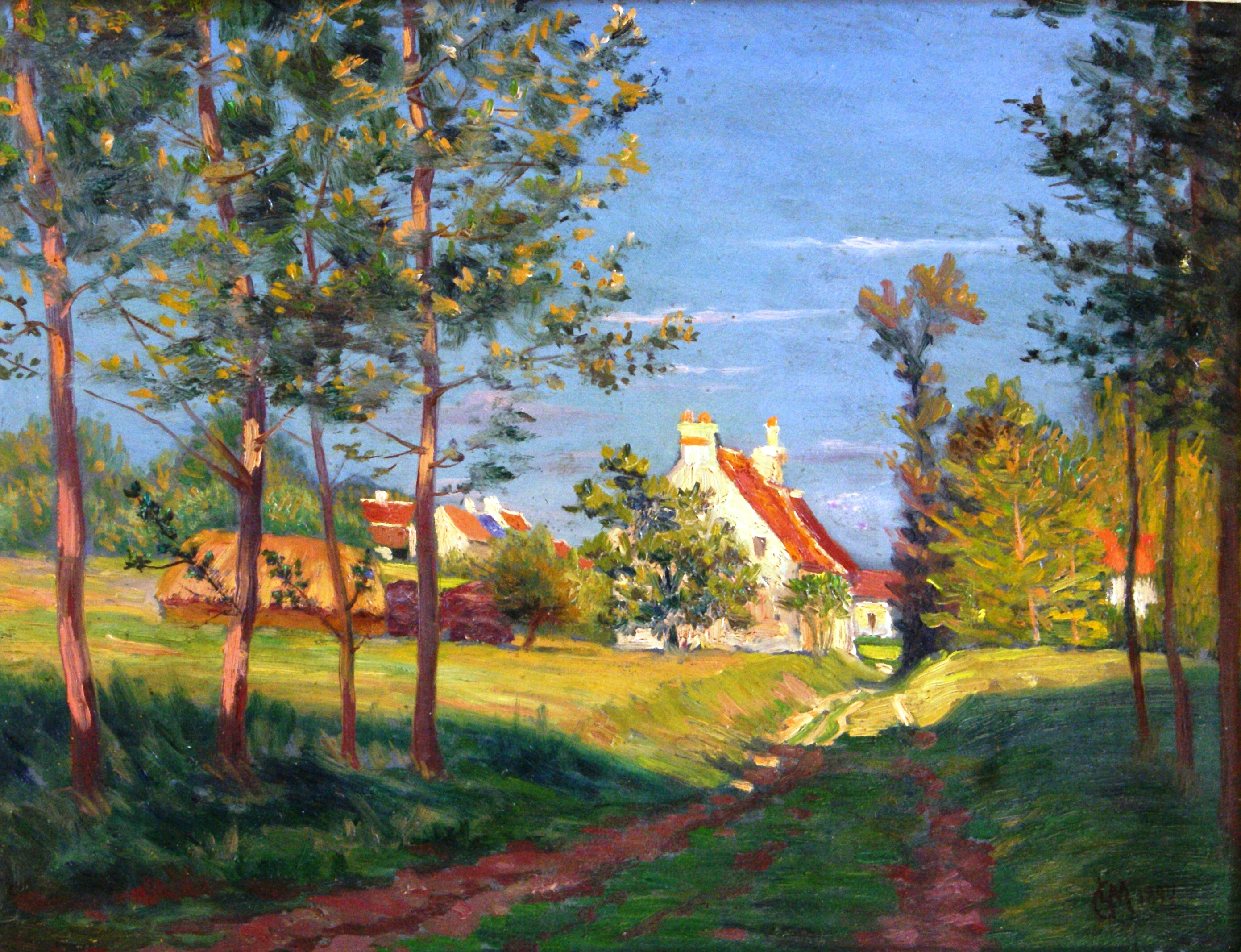 Léo Gausson - L'entrée du Hameau